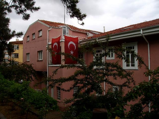 Pembe Köşk